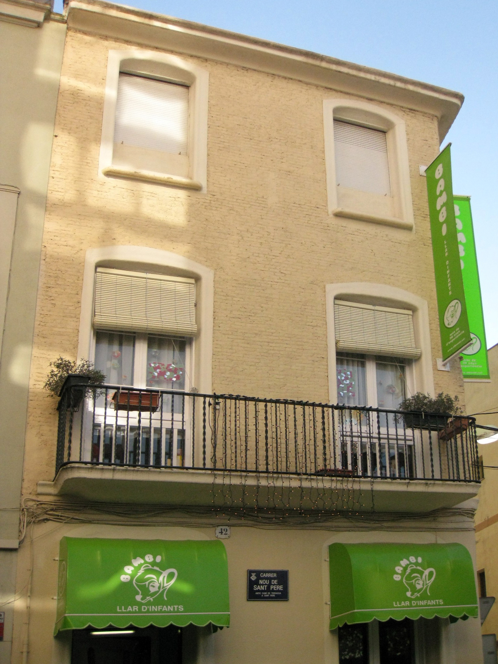 Casa Antoni Pous, al carrer Nou de Sant Pere núm. 42, cantonada amb el carrer del Passeig (Terrassa). Obra de Lluís Muncunill del 1907.